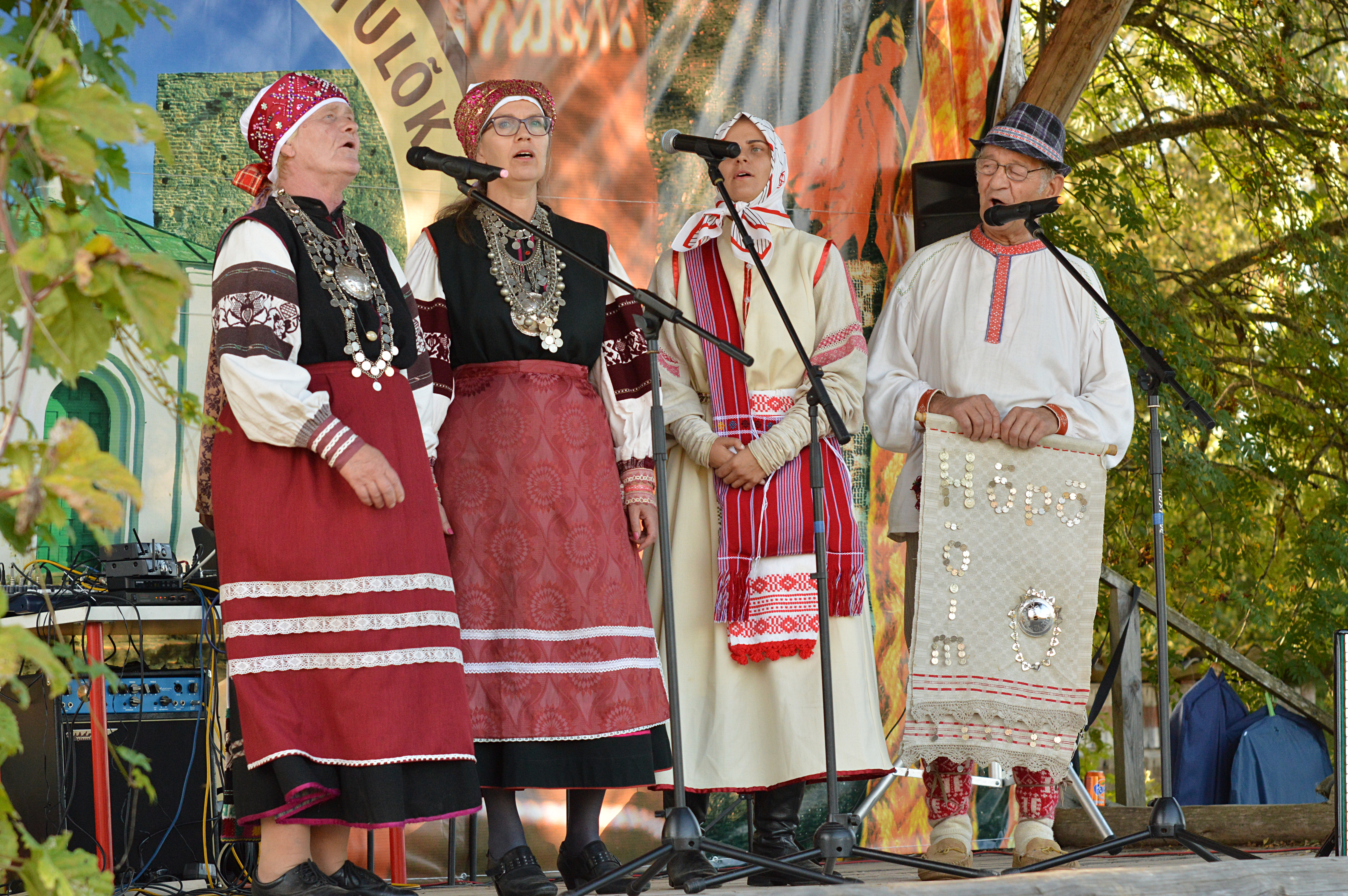 Seto kultuuri festival Radajal.